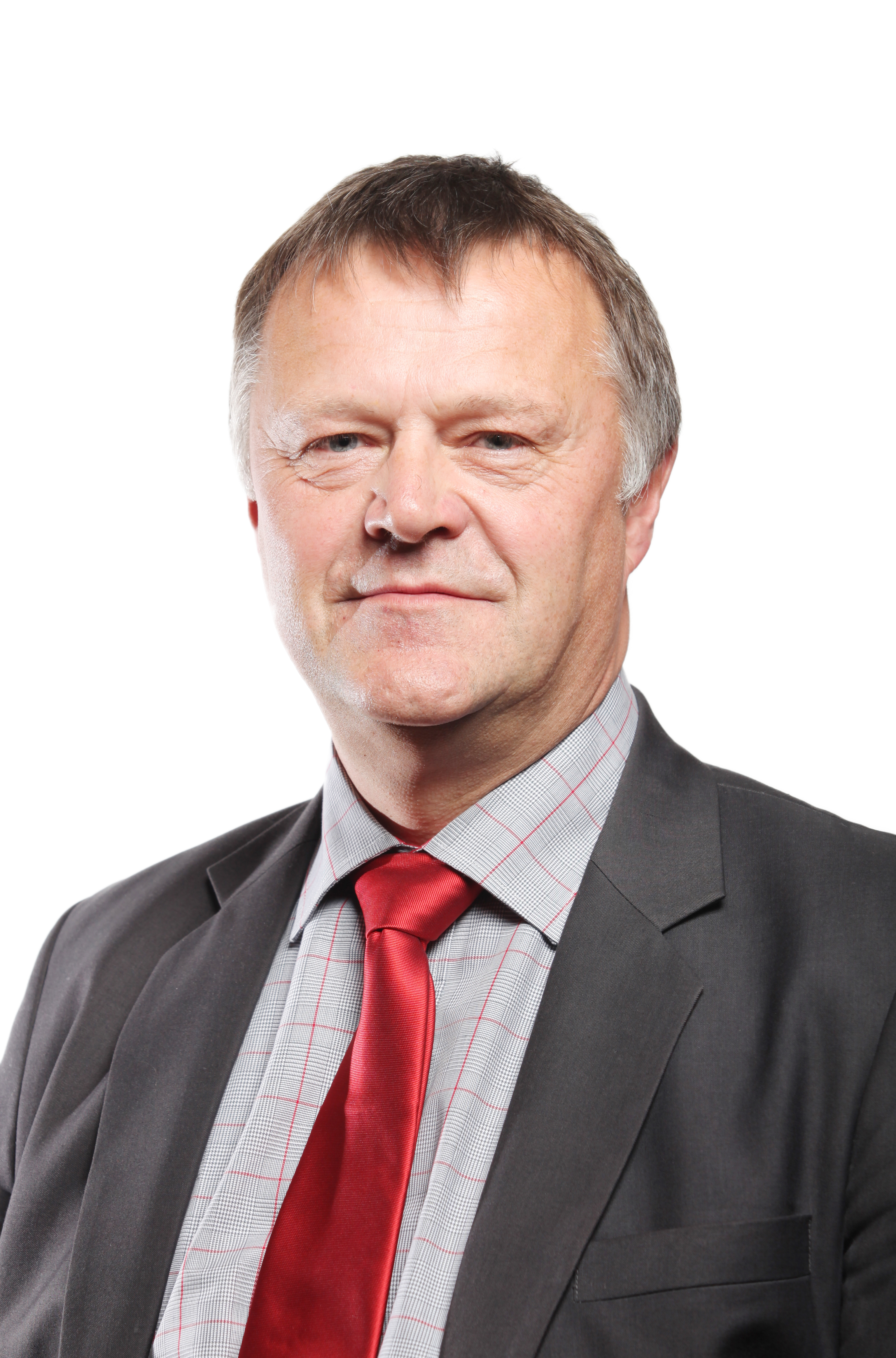 Medlem av næring- og kulturkomitéen. Foto: Kenneth Hætta / Sametinget.